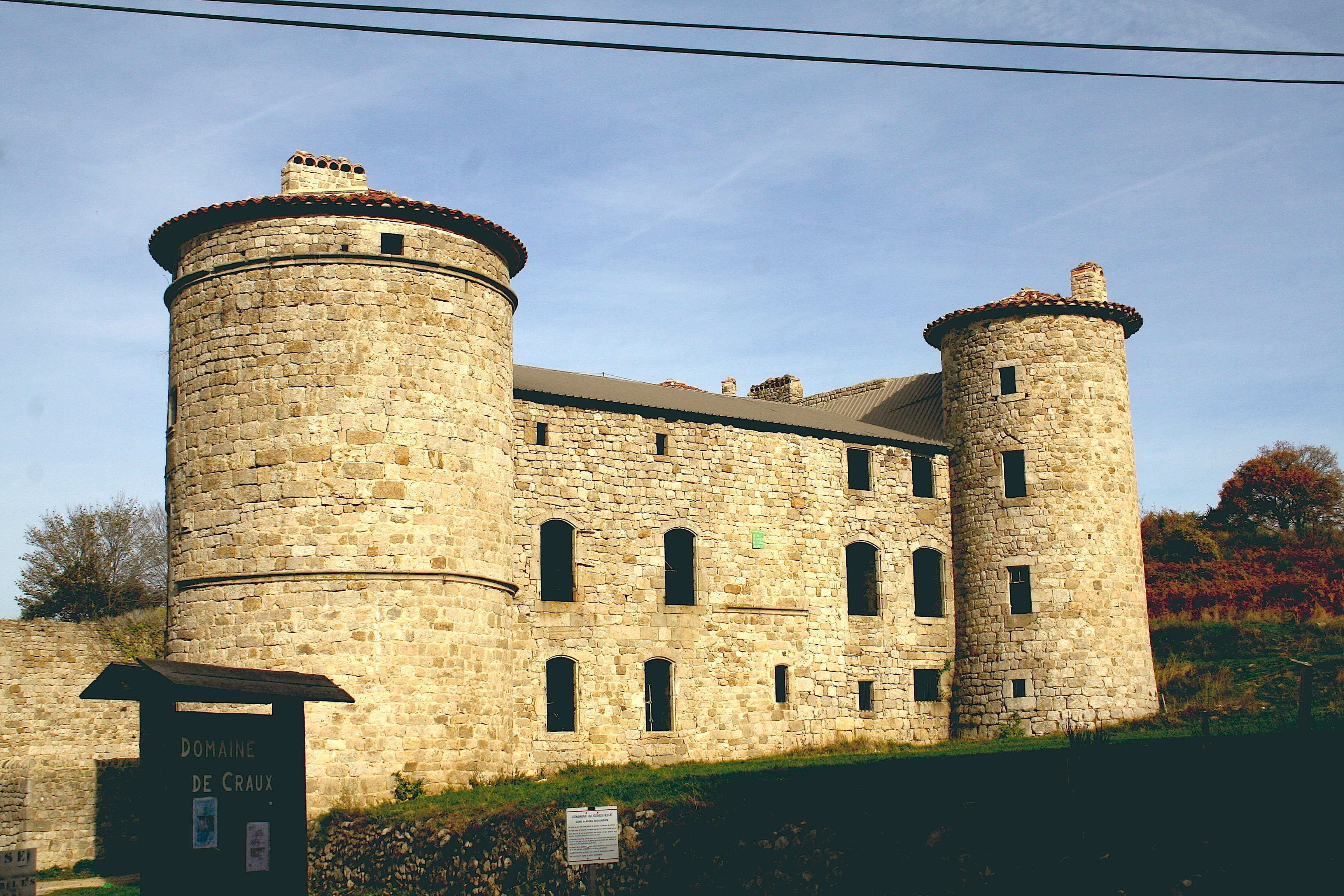 Château de Craux, Ardèche